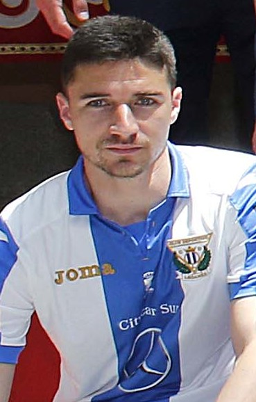 Felicidades pepineros!! Vuestro ascenso a Primera es la historia de un sueño, el resultado de vuestro trabajo y esfuerzo. Sois un orgullo para todo Madrid! Enhorabuena CD Leganés. #LeganésEsDePrimera